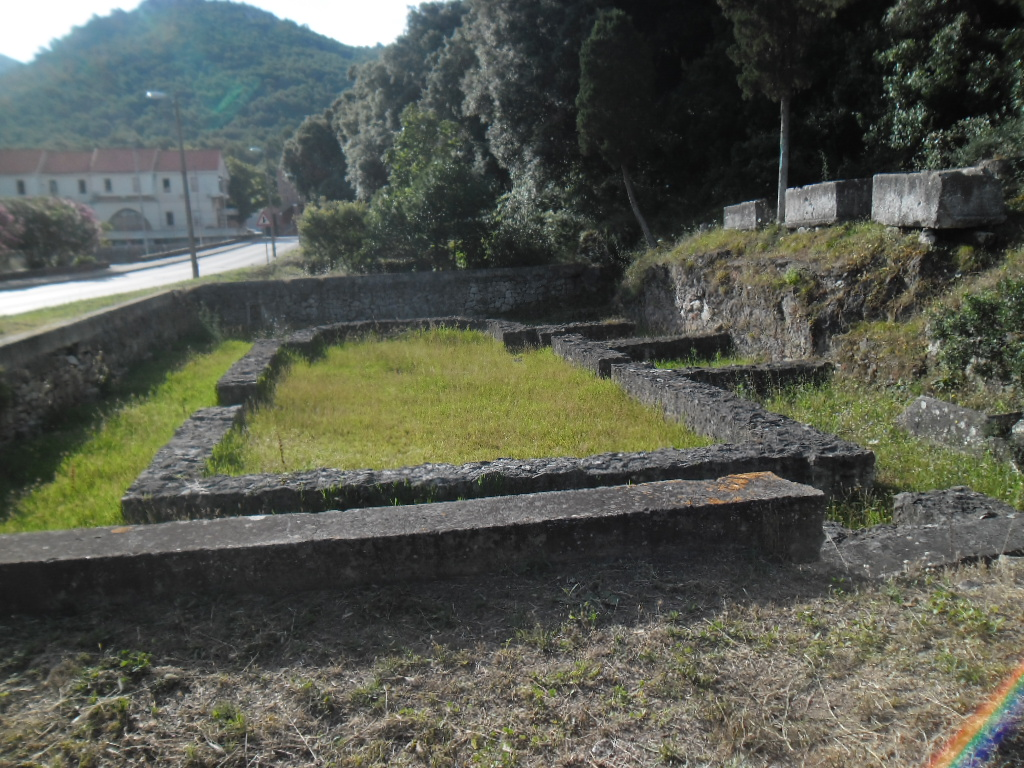 otok Lastovo